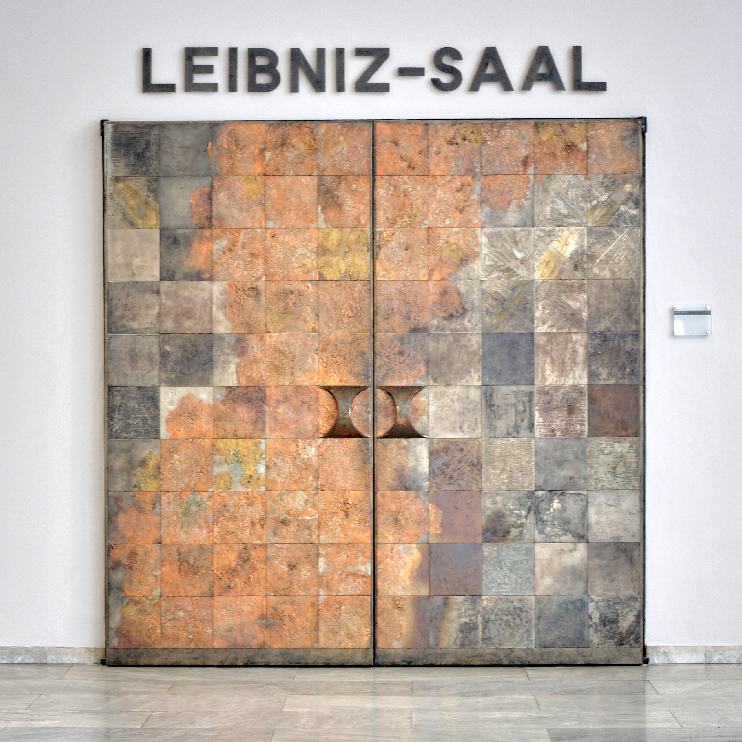 Landtag Niedersachsen, Hannover Wikipedia im Landtag – Niedersachsen 19. März 2013 in HannoverDieses Bild entstand während eines Fototermins im Niedersächsischen Landtagsgebäude in Hannover vor dem geplanten Abriß und Neubau bis 2017. Die Landtagsverwaltung hat uns gestattet, alle Räume zu dokumentieren.